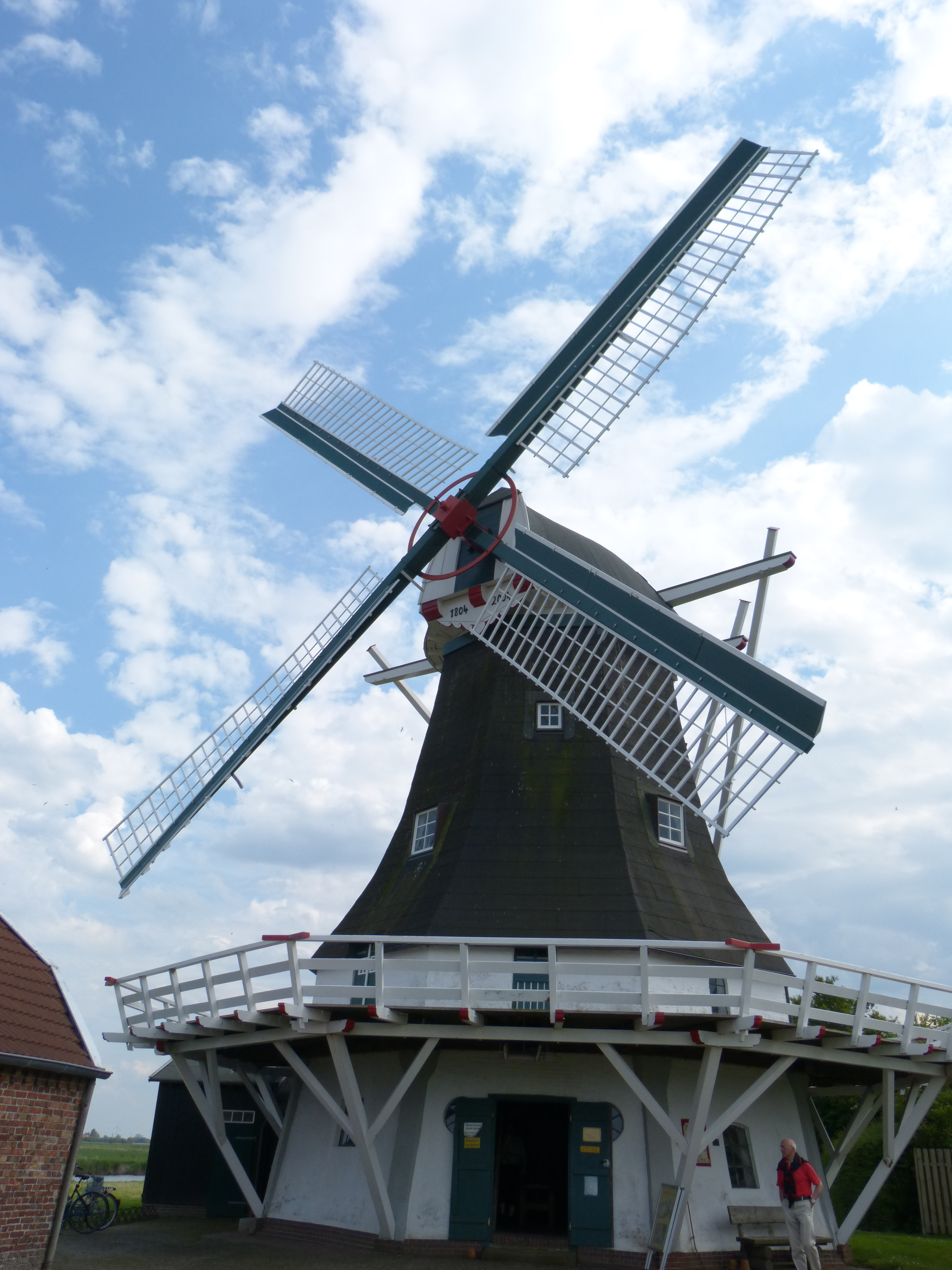 Die über 200 Jahre alte, denkmalgeschützte Seriemer Mühle steht nahe der ostfriesischen Nordseeküste; Neuharlingersiel.